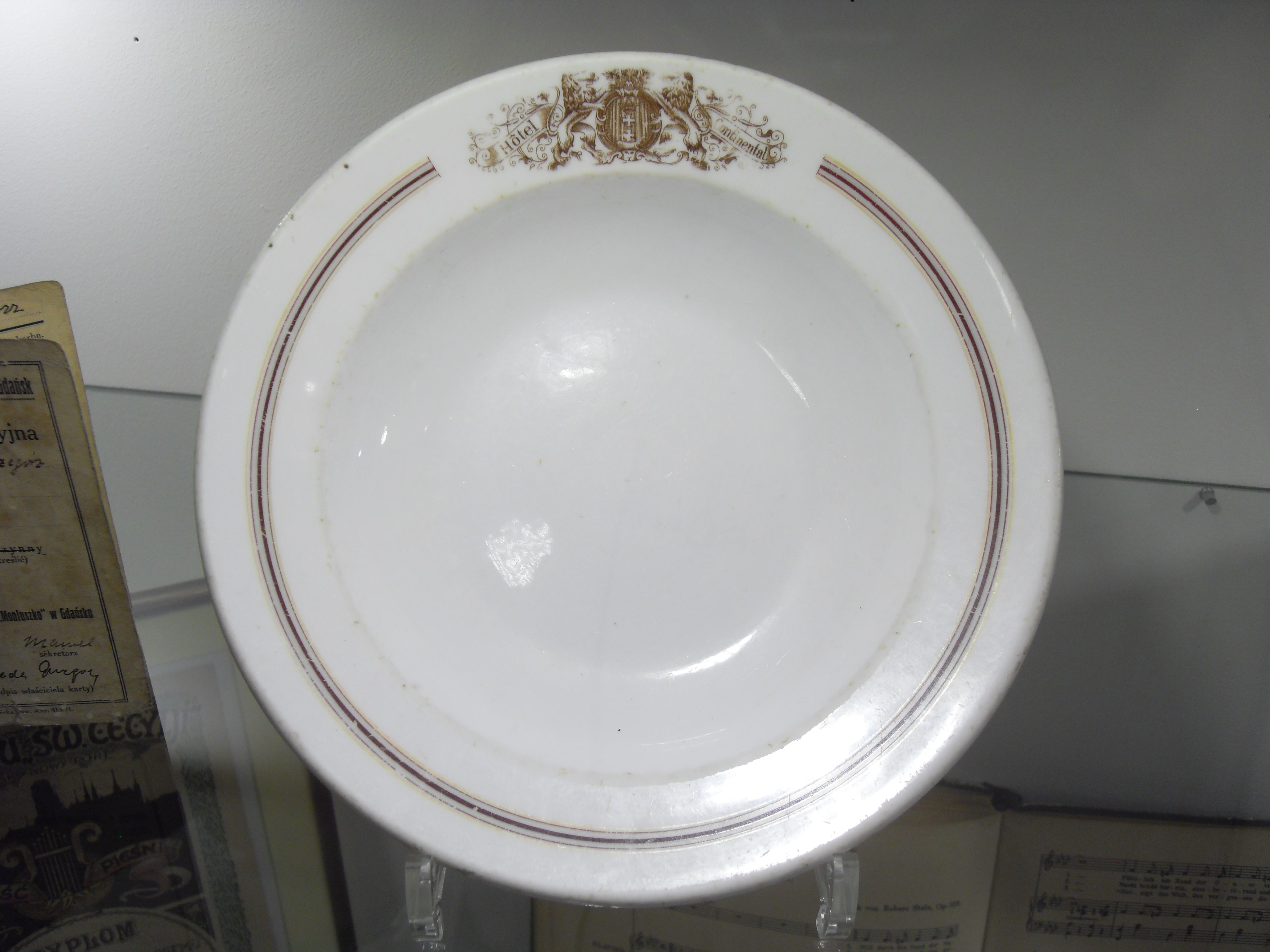 Muzeum Poczty Polskiej w Gdańsku, talerz z nieistniejącego gdańskiego Hotelu Continental.